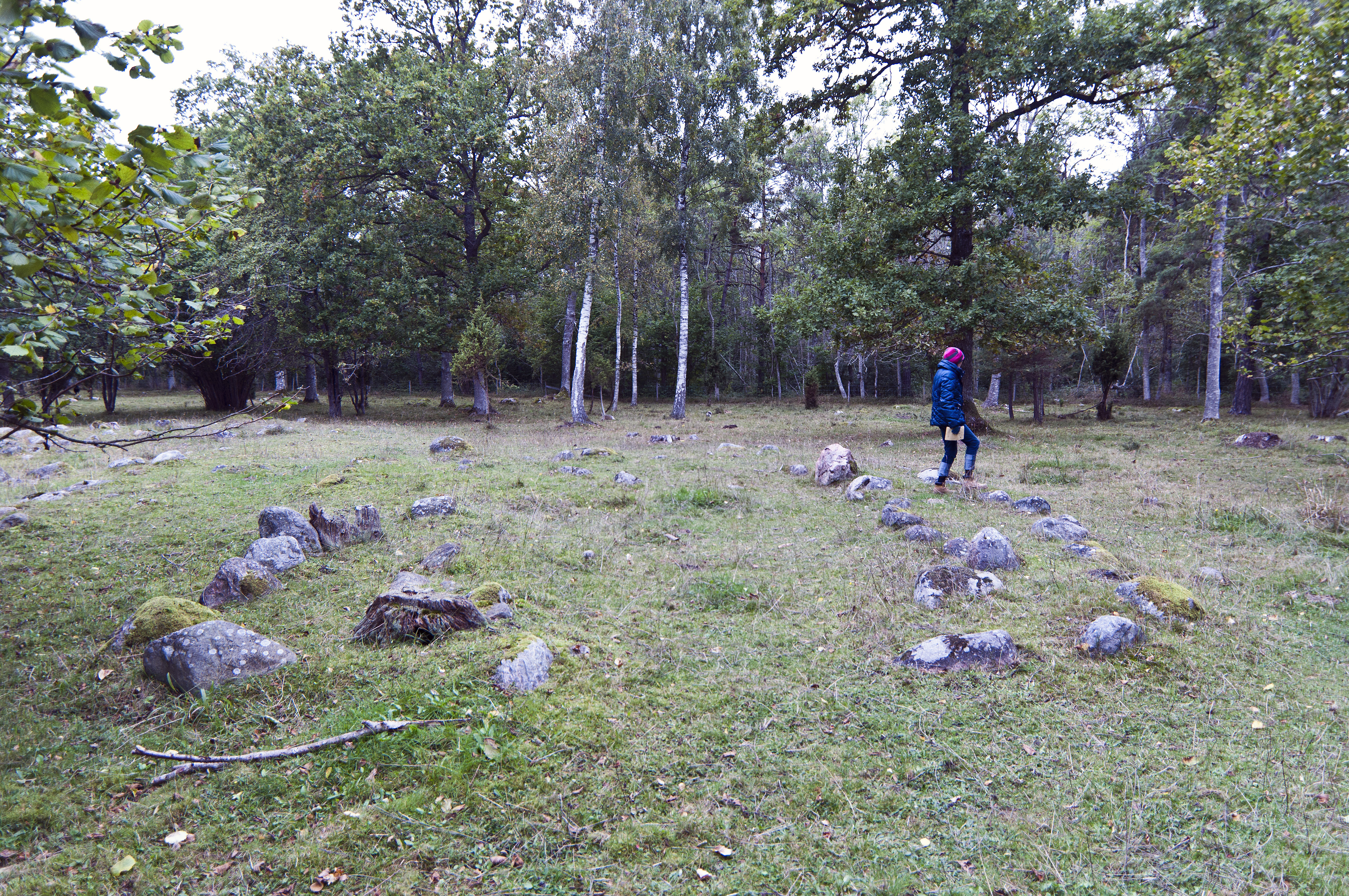 Husgrund från järnålder